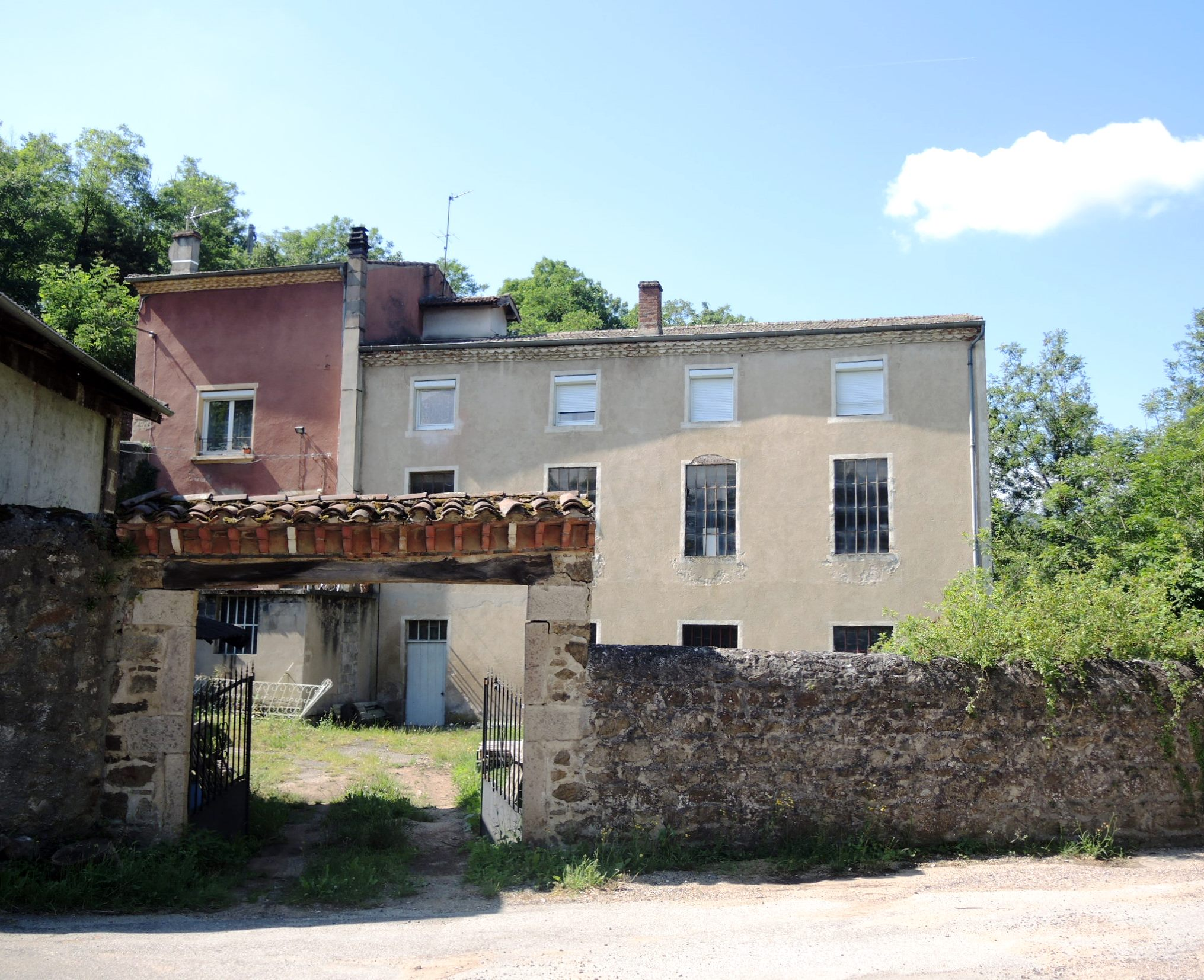 Vinzieux détail